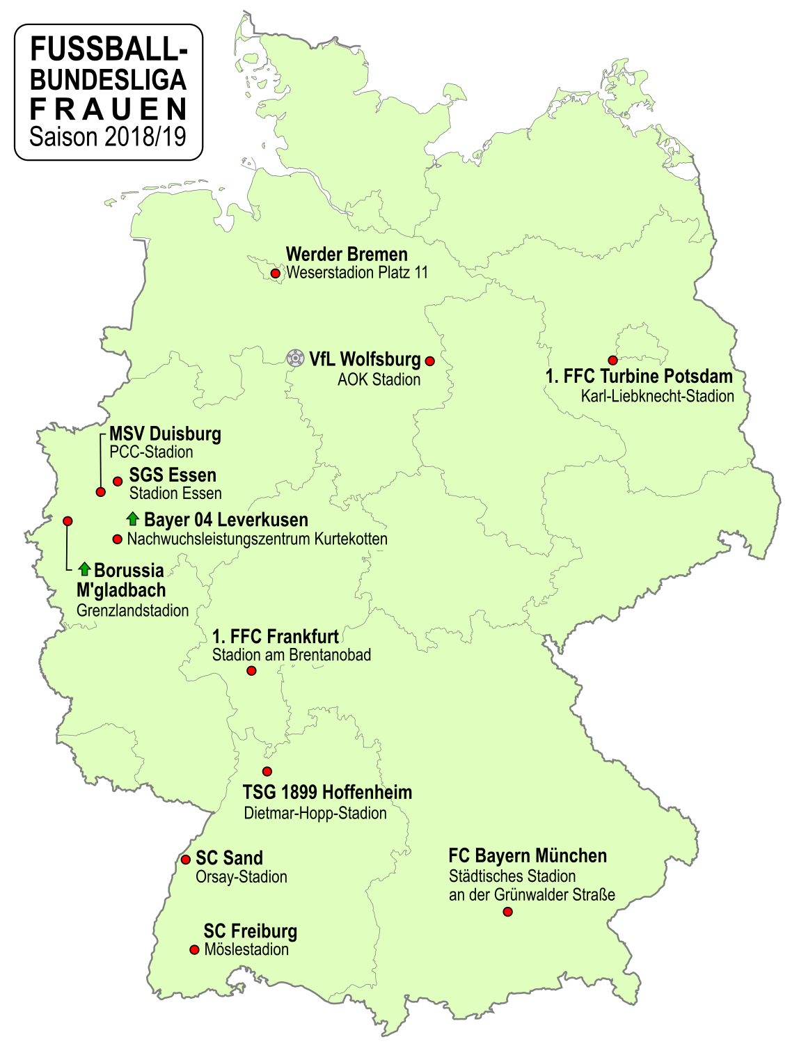 Karte der Vereine der Frauen Fußball-Bundesliga-Saison 2018/2019